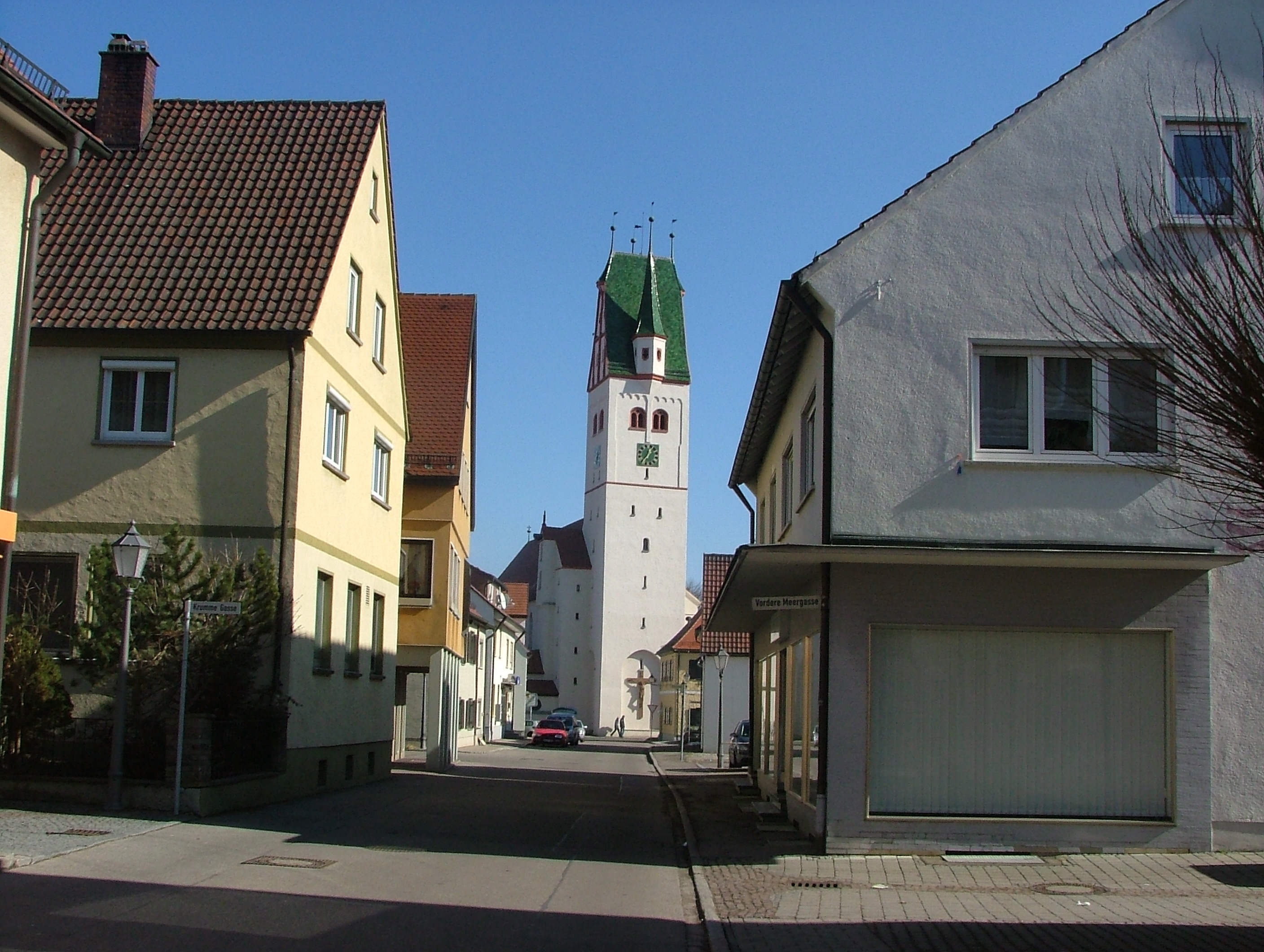 Dietenheim